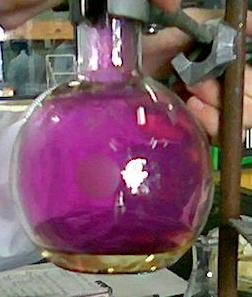 Yodo Sublimandose